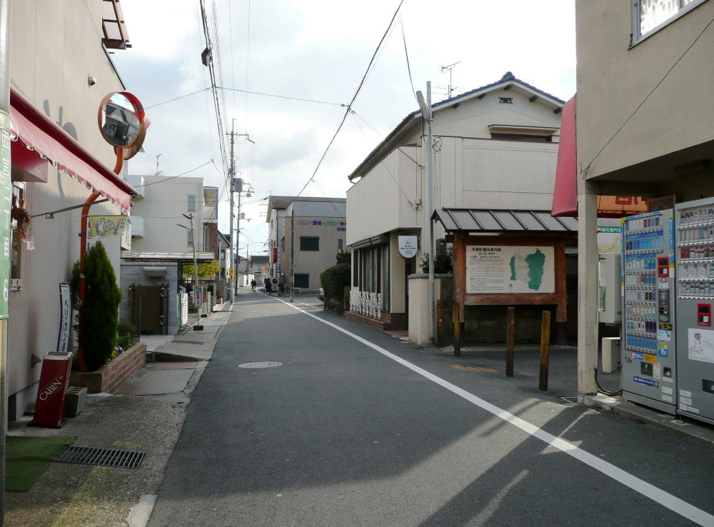 Kinki Nippon Railway,Ikoma Line,Tatsutagawa Station. /近鉄生駒線駅竜田川駅・駅前通り（南側）。画面中ほどより右手が駅入口。